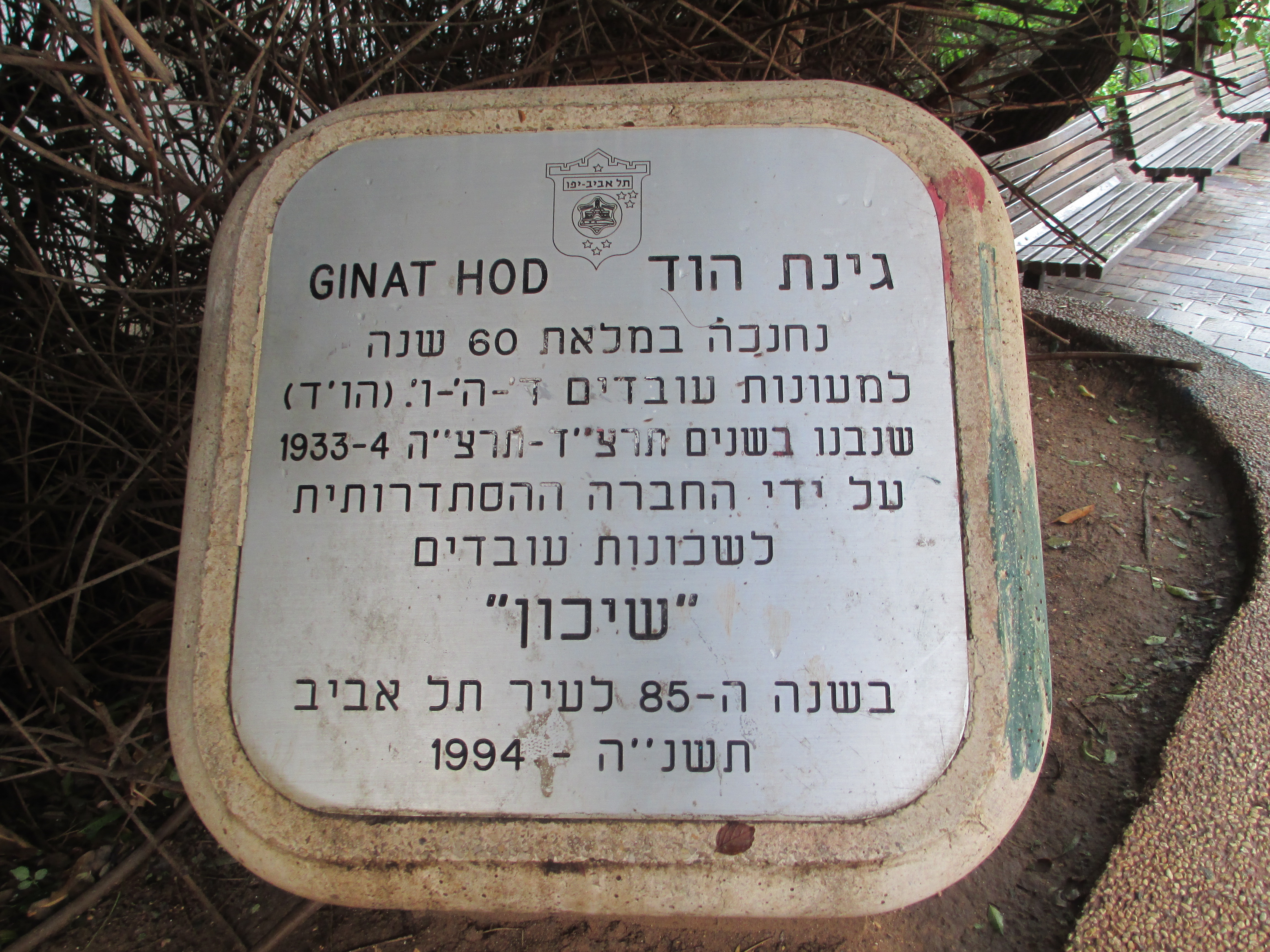 לוחית זיכרון בגינת הוד בתל אביב